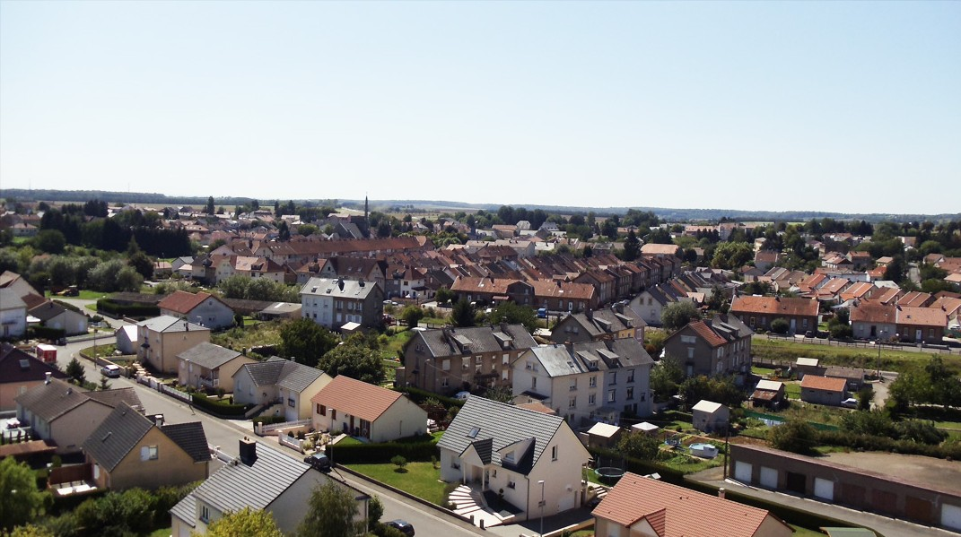 Vue sur Aumetz depuis le haut du chevalement de la mine (34m)